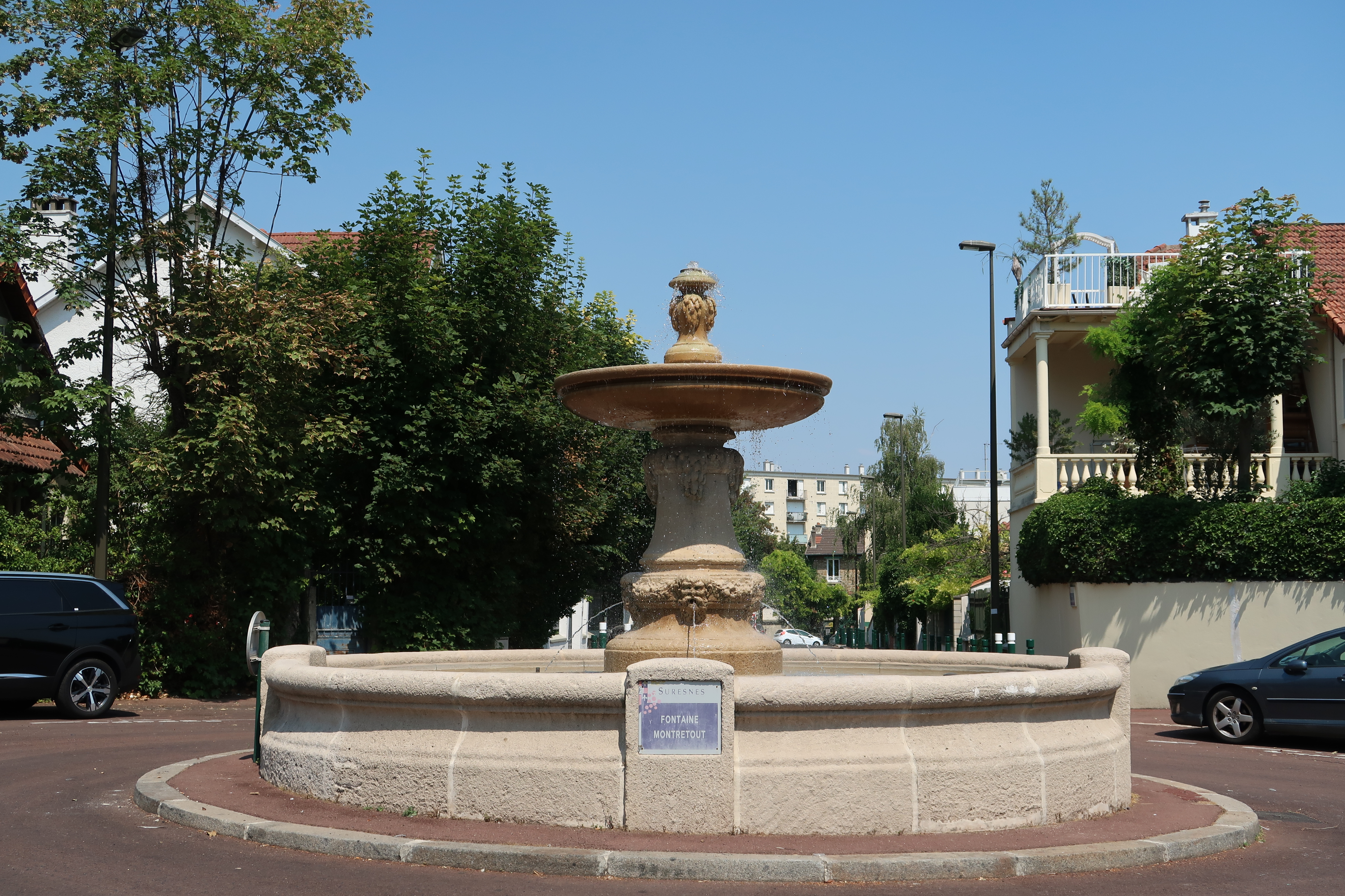 Fontaine Montretout, au croisement de la rue Raymond-Cosson et de la rue de Montretout, à Suresnes (Hauts-de-Seine).